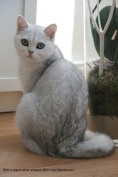 Britisch Kurhaar in black silver shaded